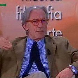 Foto di Vittorio Feltri a Cortina d'Ampezzo nel 2008, con leggero ritocco